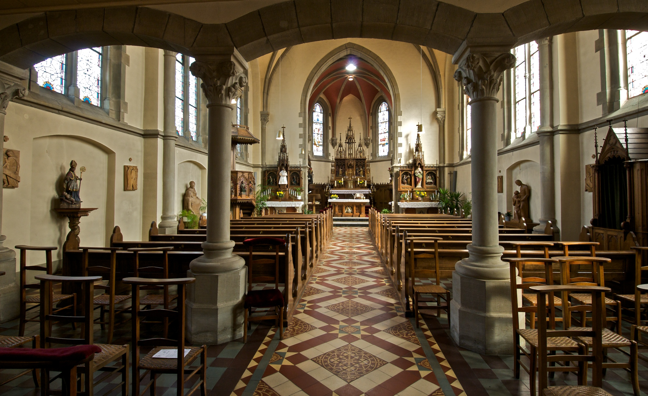 Kierch On bannen